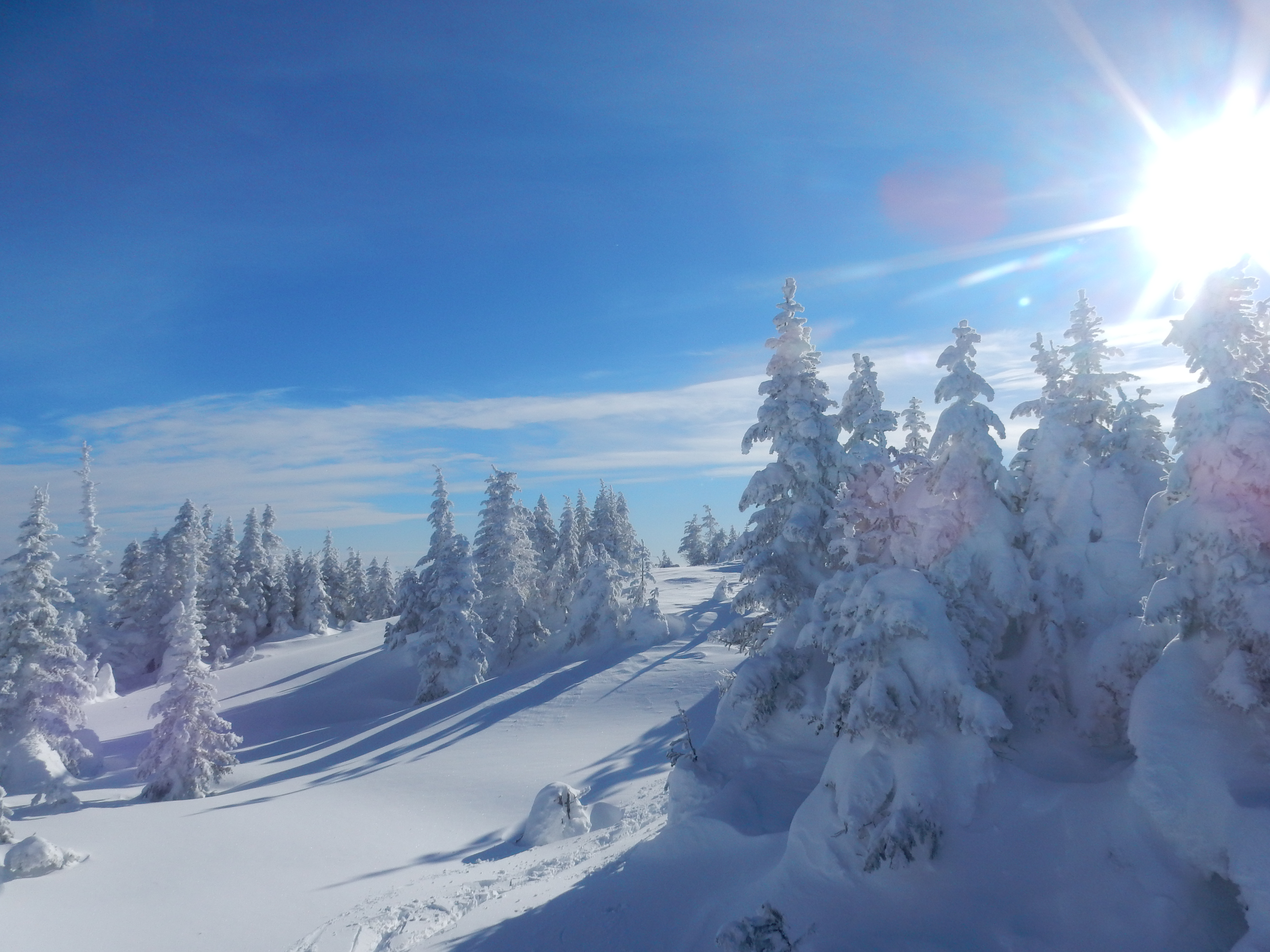 Vallée des fantômes, dans les Monts Valin, au Québec.